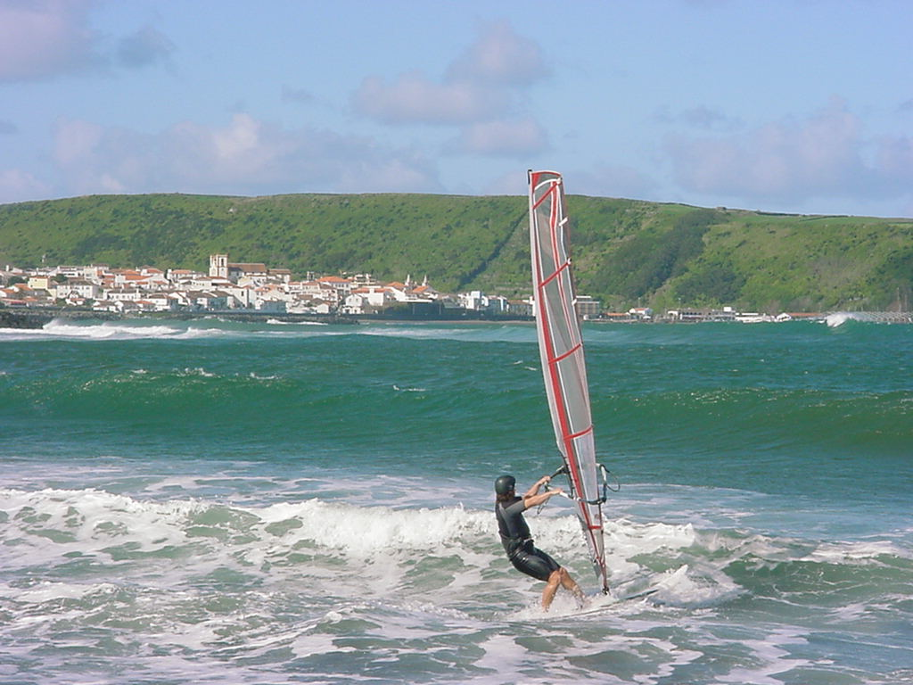 Baía da Praia da Vitória, ilha Terceira, Açores, Portugal.